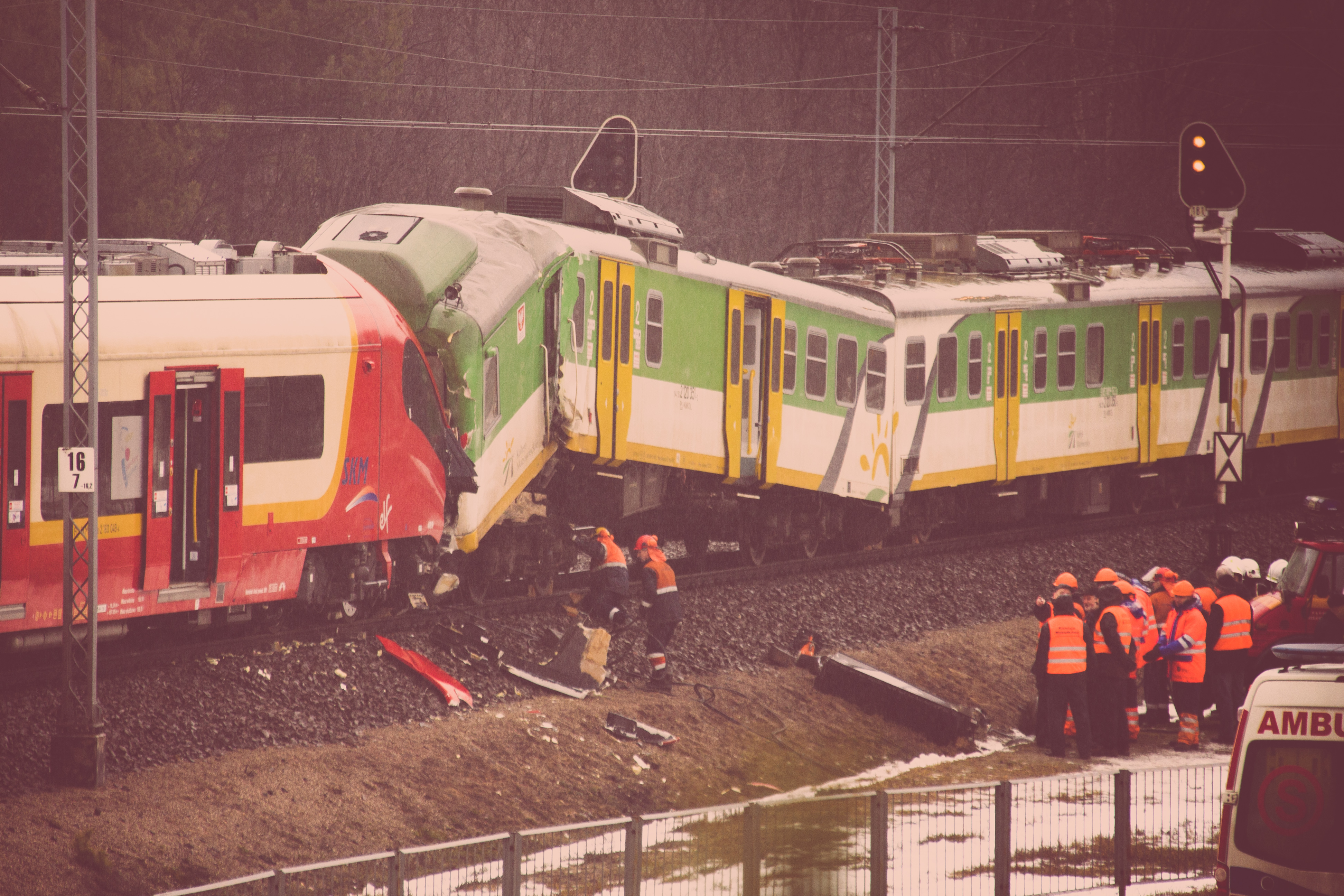 Buuuum!!! 10 lutego o 5:23 w kilometrze 16,7 linii kolejowej Warszawa - Terespol - Granica Państwa doszło do najechania pociągu Szybkiej Kolei Miejskiej na koniec pociągu Kolei Mazowieckich linii KM204. Dla obsługi i pasażerów zdarzenie skończyło się na zadrapaniach. Złośliwi natychmiast nazwali uszkodzoną jednostkę Kolei Mazowieckich concordem.